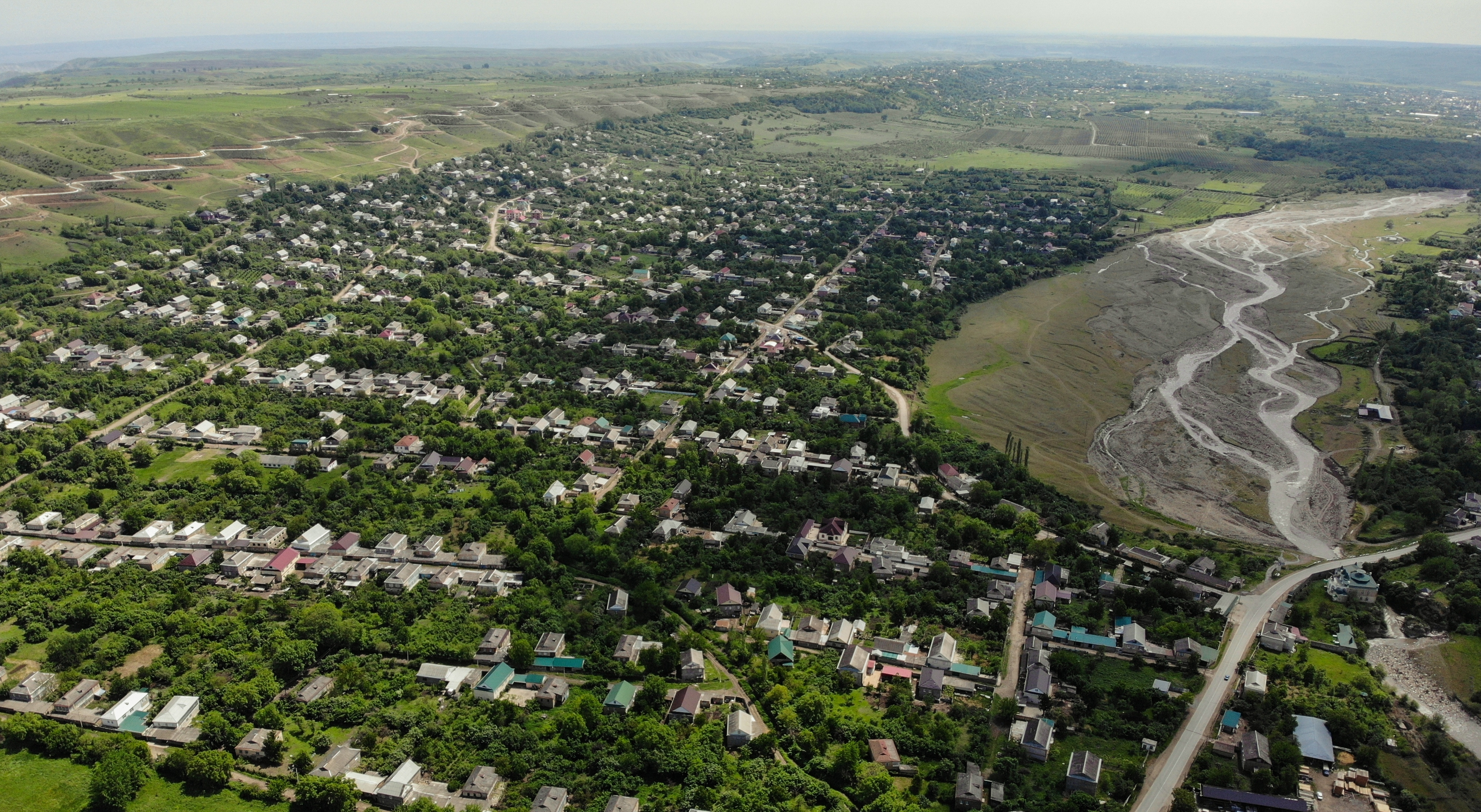 Куркент